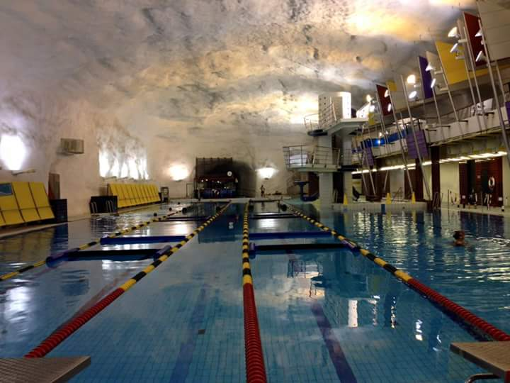 Hindersimningsmomentet i militär femkamp